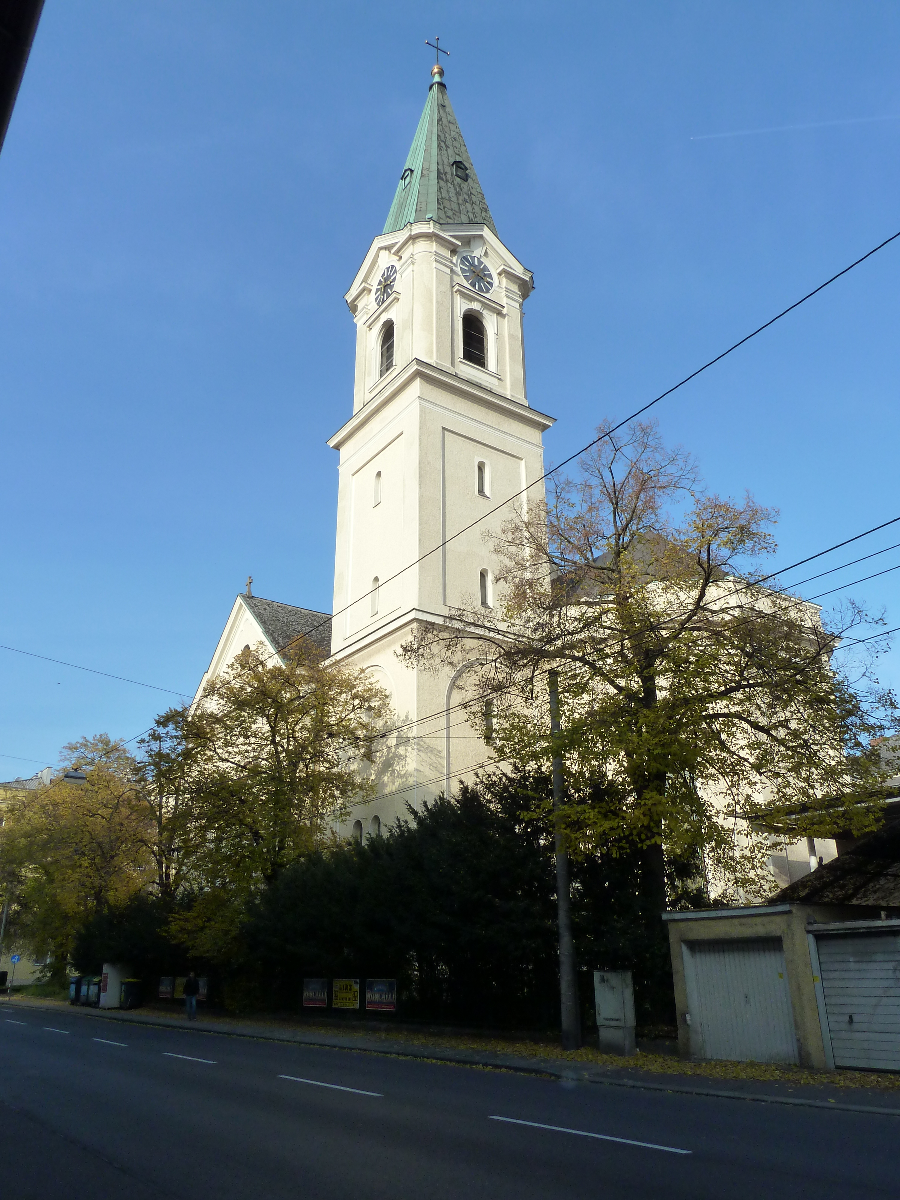 Kath. Filialkirche Hl. Familie